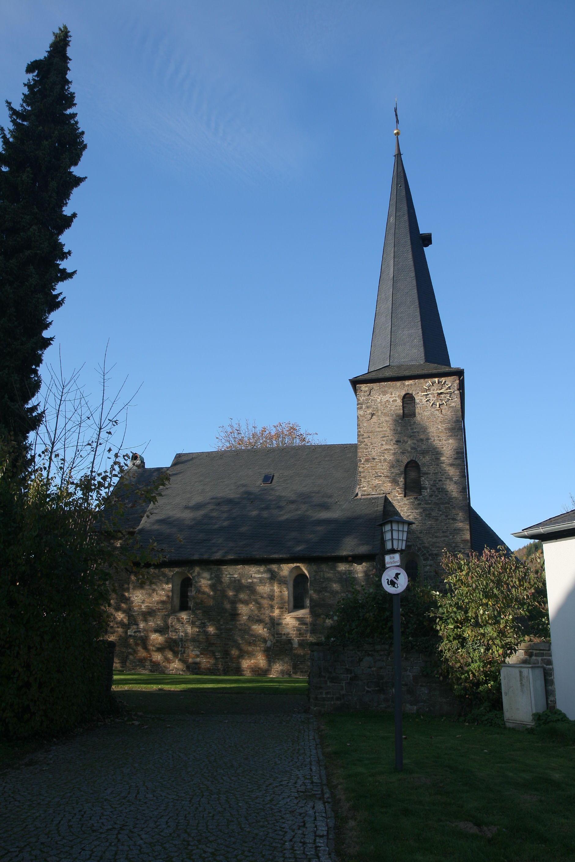 Evangelische Kirche Ohle in Plettenberg-Ohle, Alter Weg 3. This image shows a heritage building in Germany, located in the North Rhine-Westphalian city Plettenberg (no. 52).